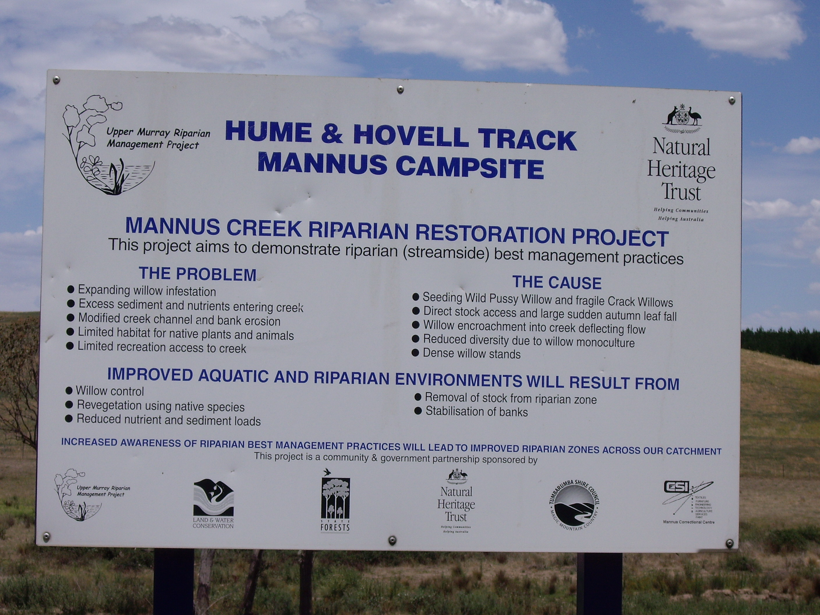 Mannus campsite